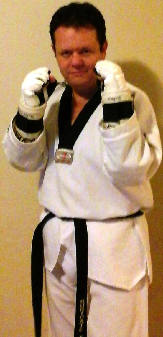 Alfonso Ribeiro - Taekwondo